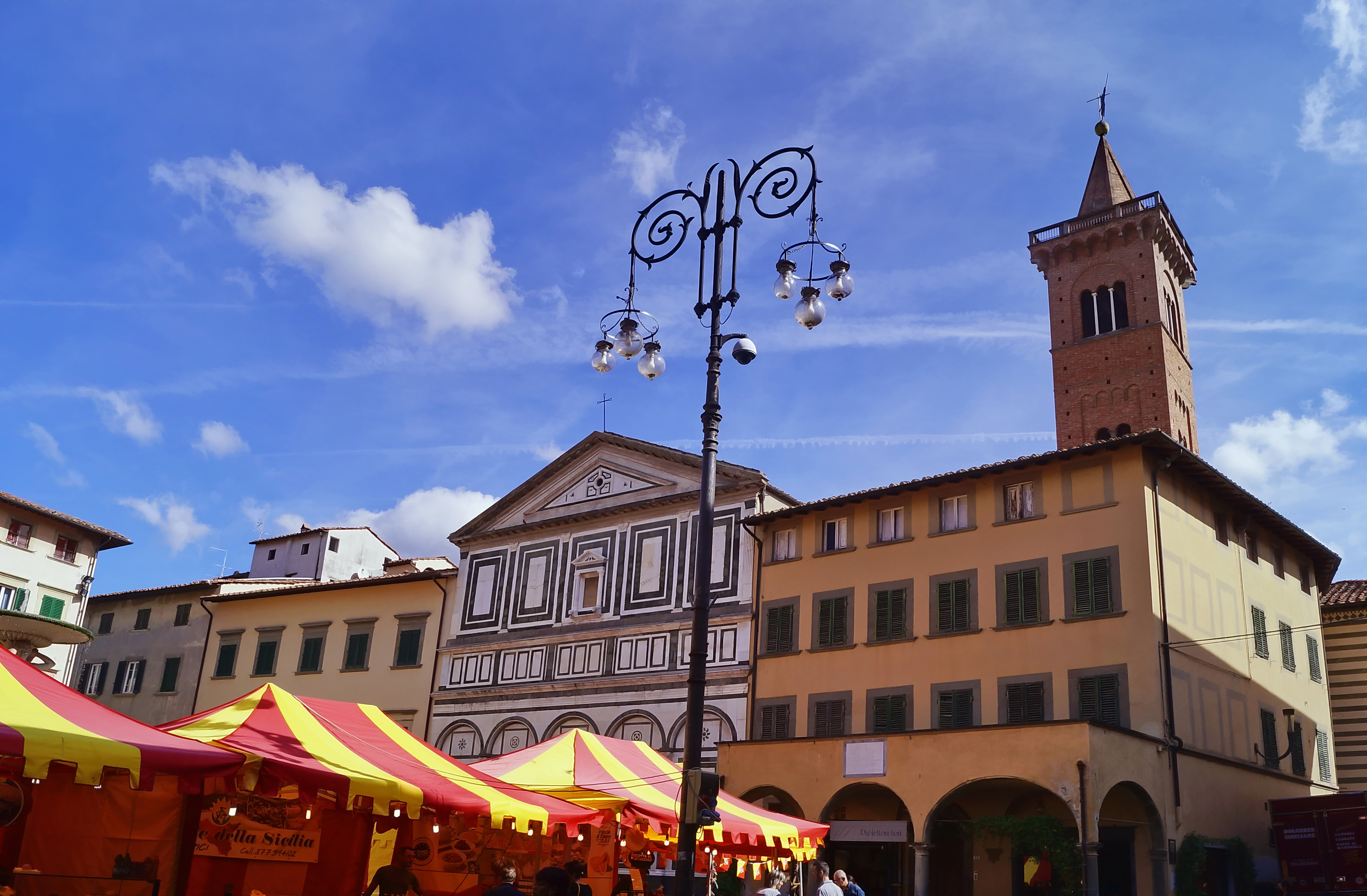 Piazza Farinata degli Uberti This is a photo of a monument which is part of cultural heritage of Italy.